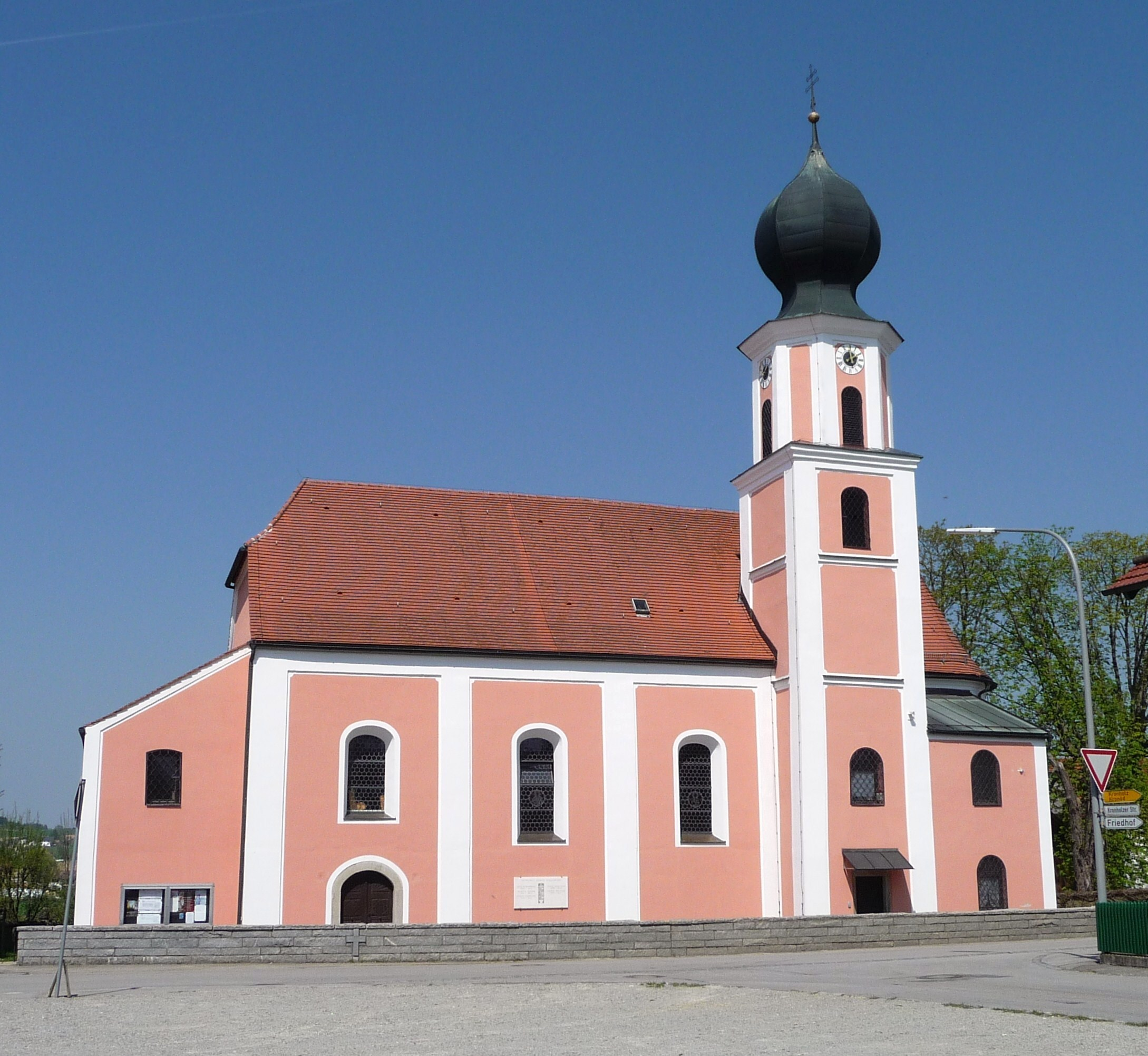 Die Pfarrkirche St. Michael in Rainding